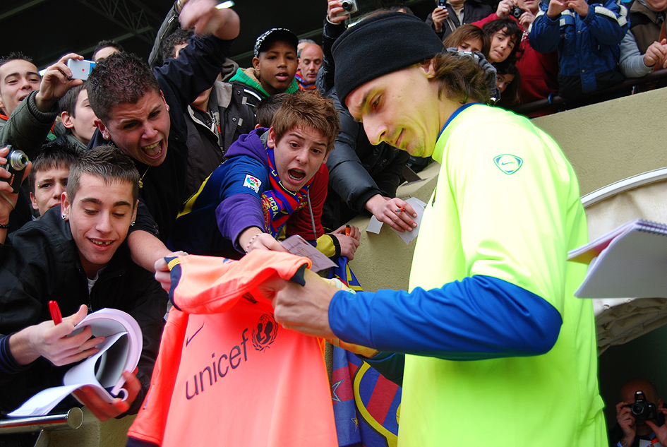 Zlatan Ibrahimovic, firmando una camiseta del FC Barcelona.